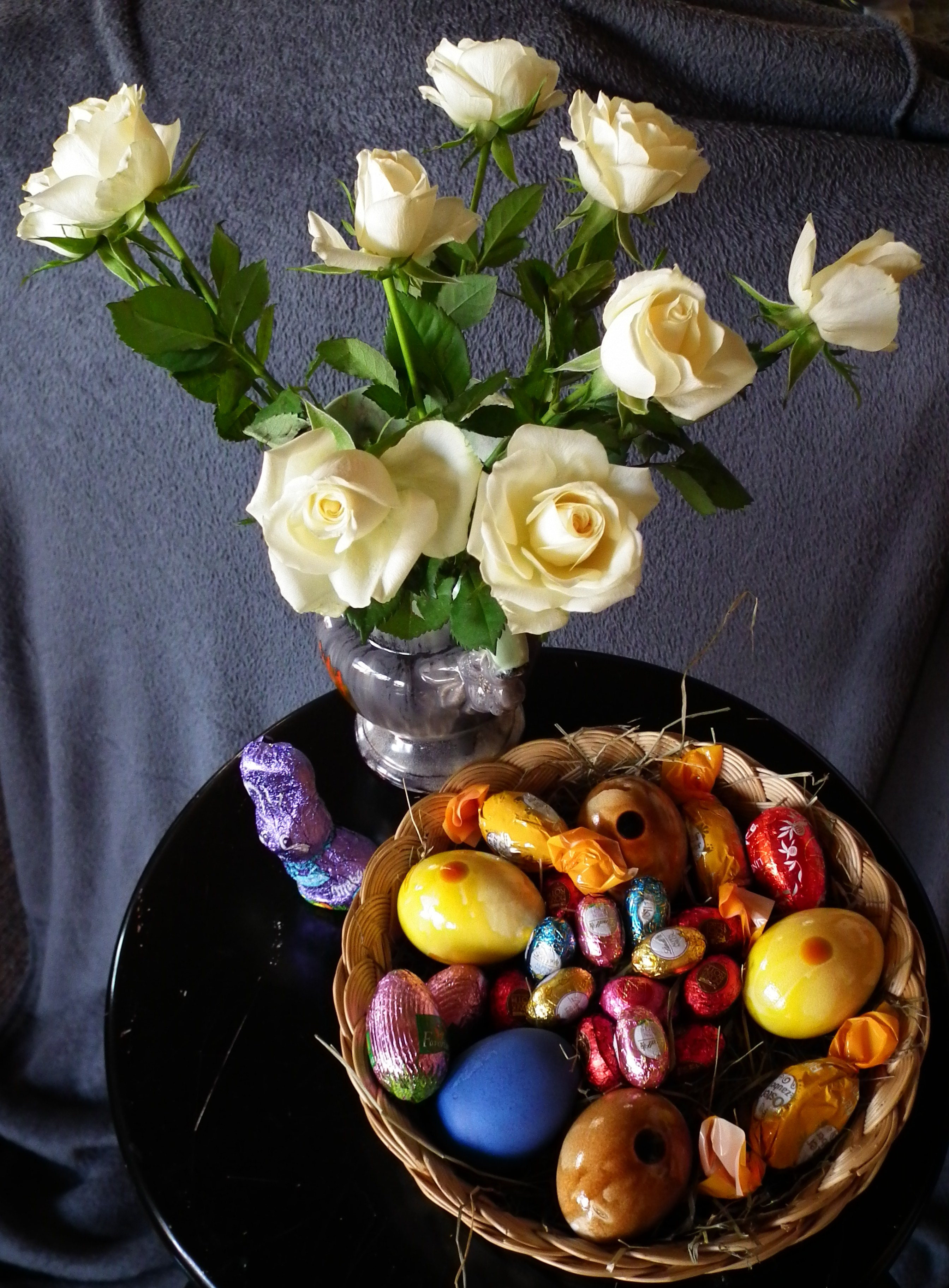 Strauß weißer Moosrosen und Osternest, fotografiert in Deutschland